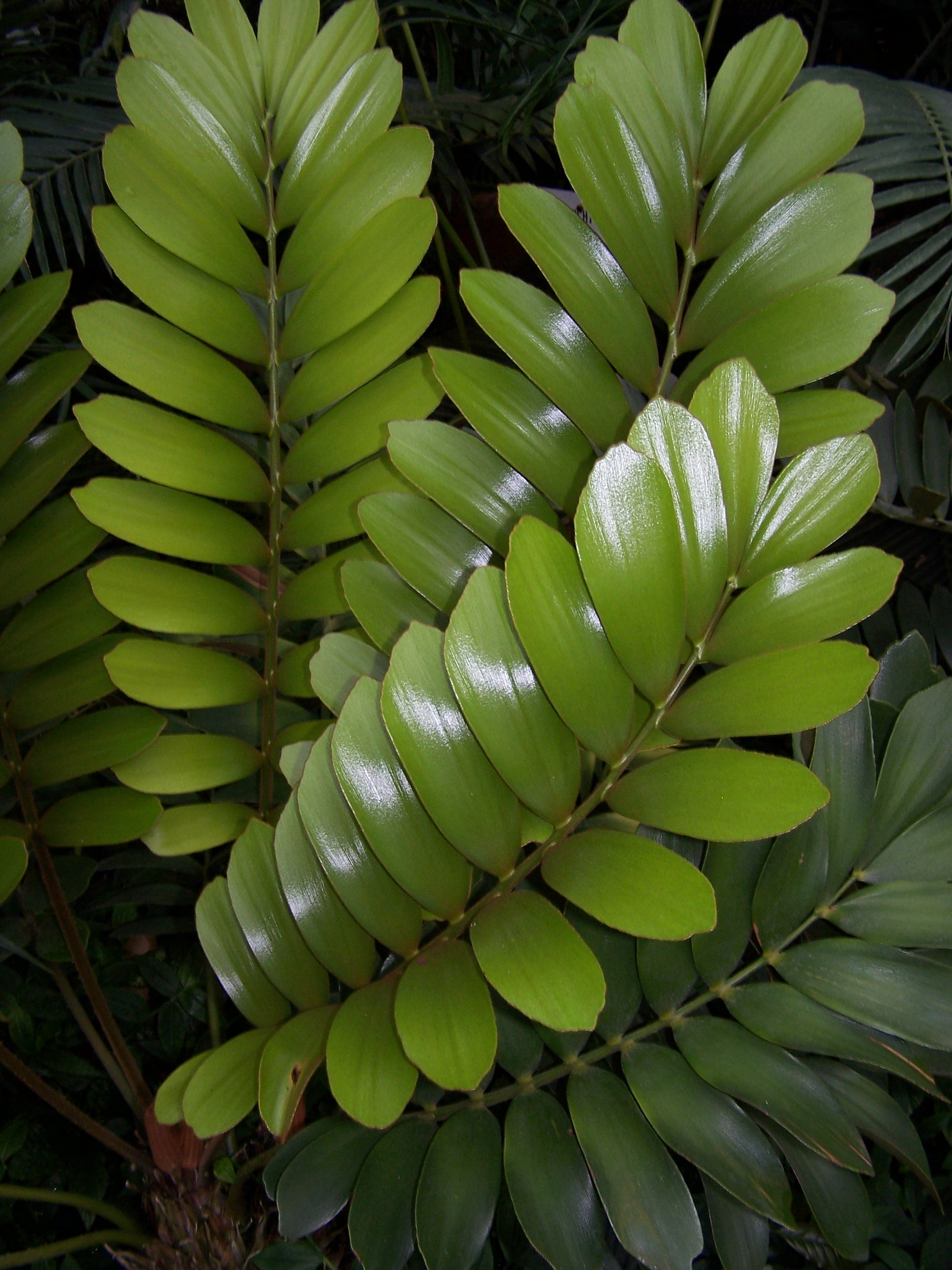 Zamia Furfuracea 17 juin 2006 Vieux jardin botanique de Göttingen